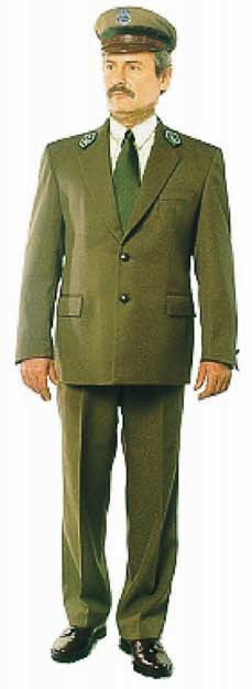 Mundur wyjściowy męski. Rysunek ten pochodzi z załącznika do Rozporządzenie Ministra Środowiska z dnia 12 marca 2007 r. w sprawie wzoru mundurów leśnika i oznak dla osób uprawnionych do ich noszenia.